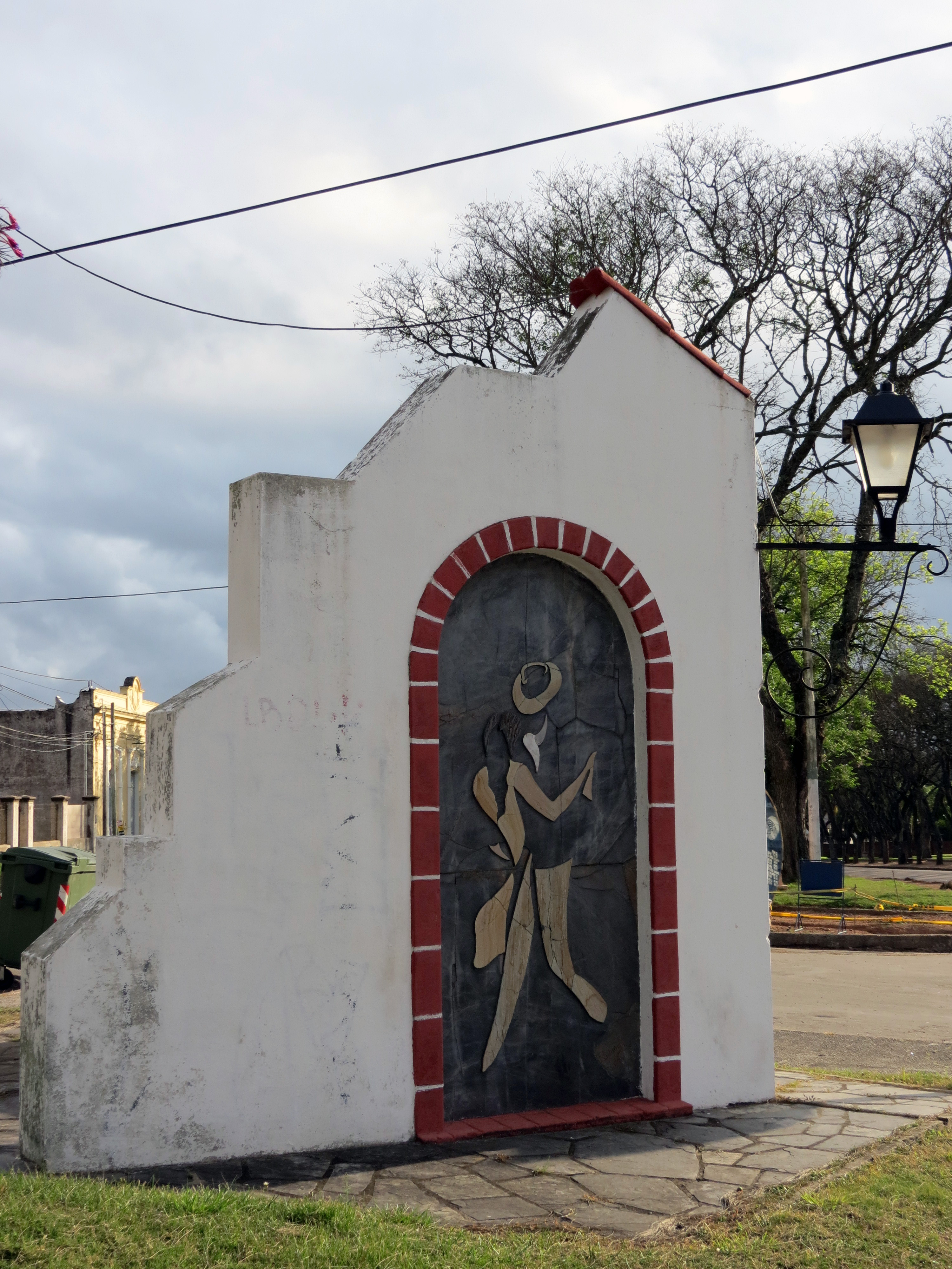 La Cumparsita. Ubicada en el departamento de Treinta y Tres